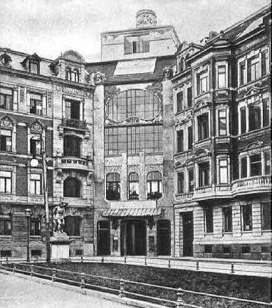 Künstlerhaus in Leipzig, Straßenfront